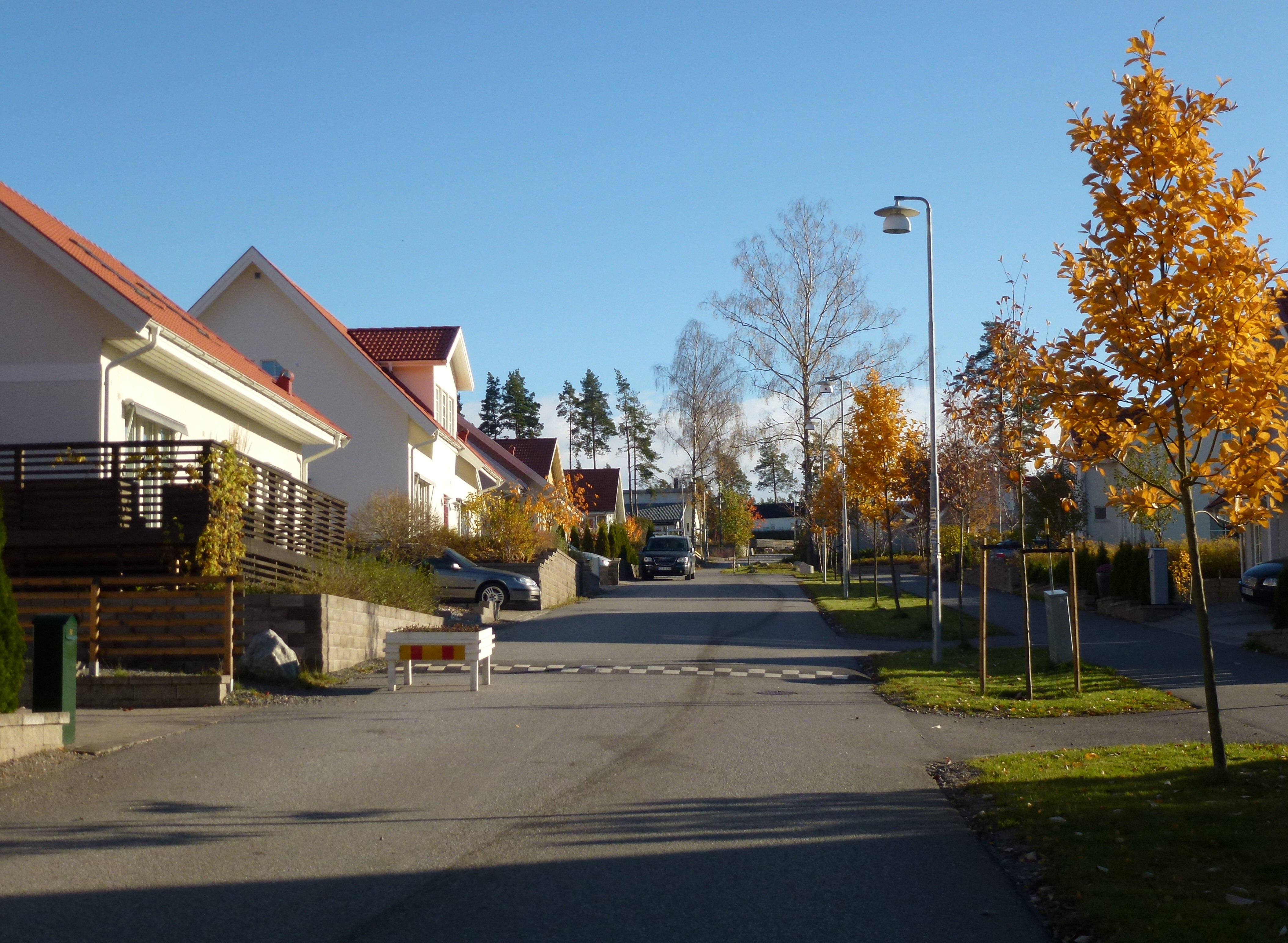 Söderby torgs alle